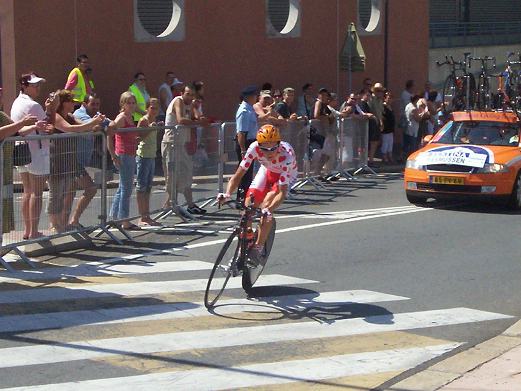 Michael Rasmüssen au tour de France 2006 lors du contre la montre reliant le Creusot à Montceau-les-mines.